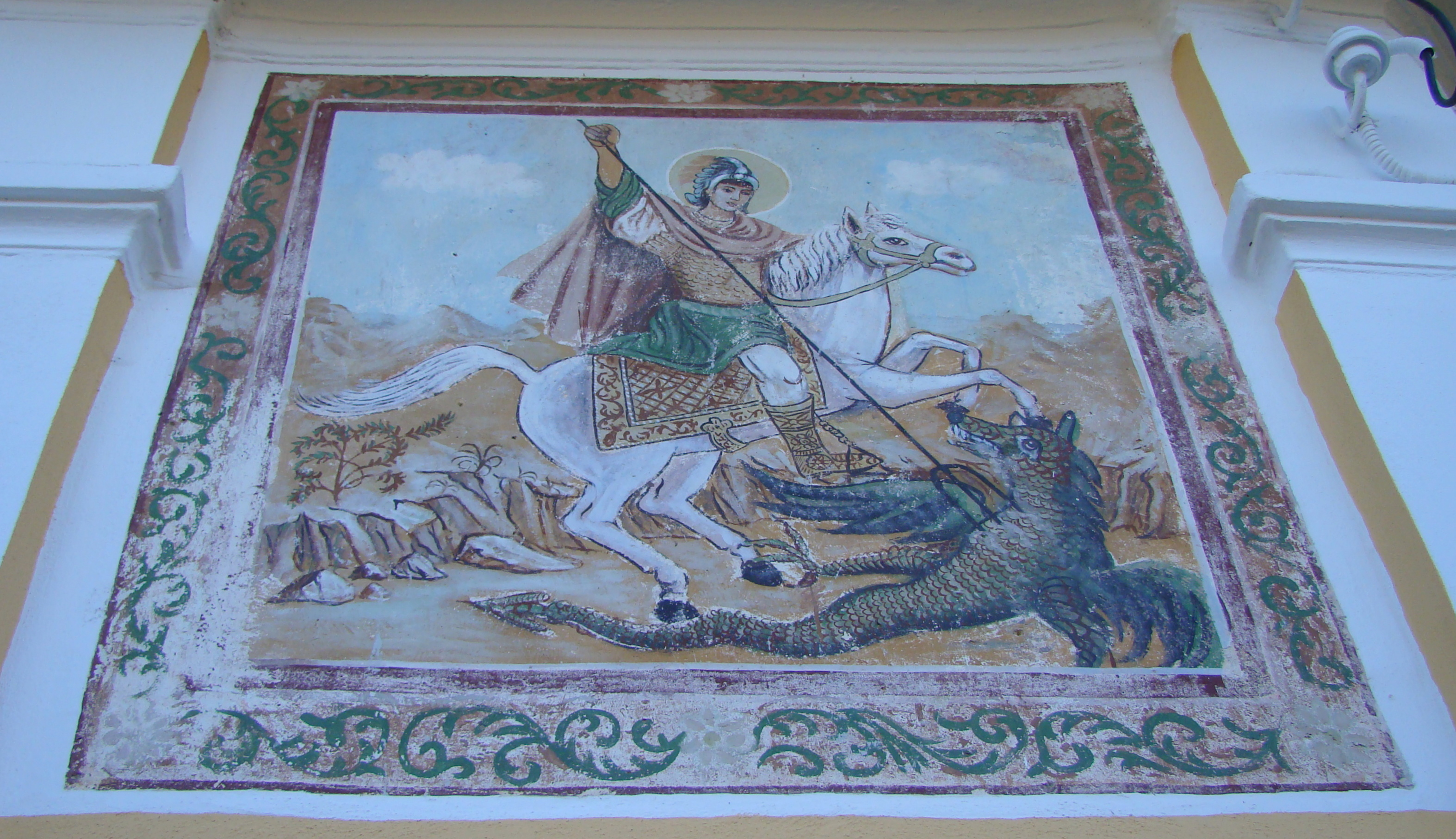 Ansamblul bisericii „Sf. Nicolae”, sat Voivodeni; comuna Voila 221 sec. XVIII